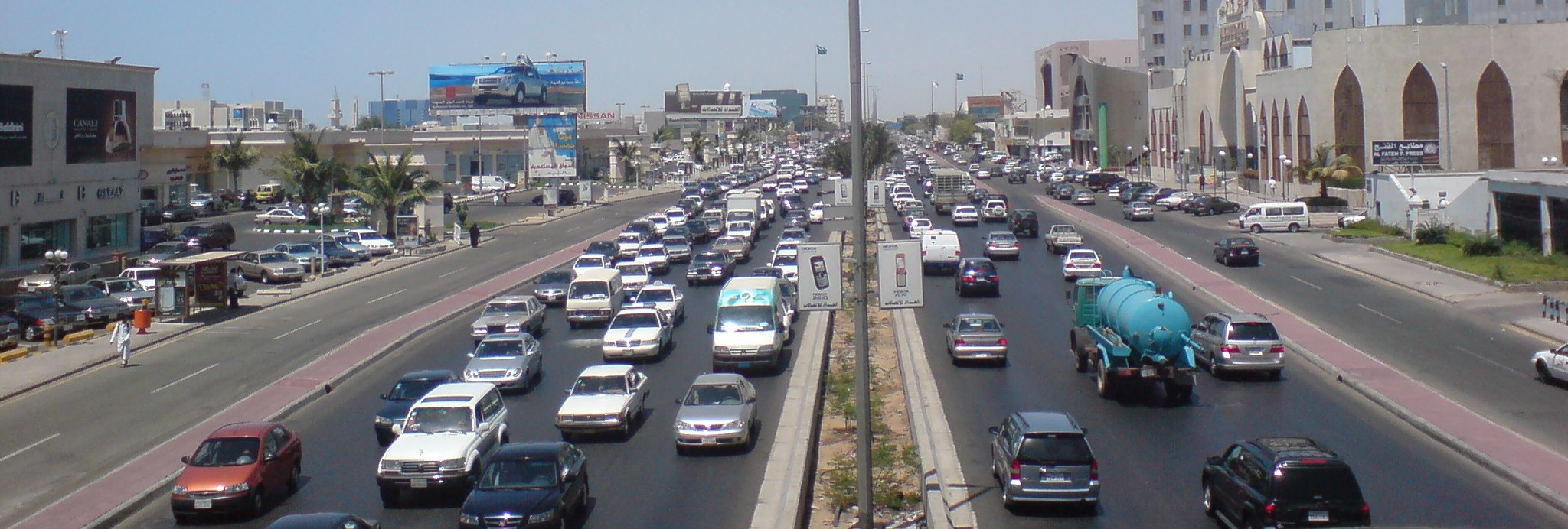 Medina Road - Jeddah - SA